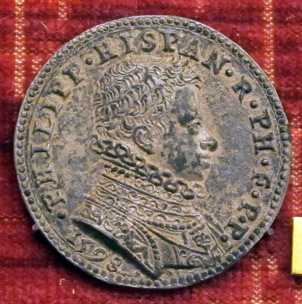 Filippo III di Spagna (1578-1621), medaglia di autore anonimo